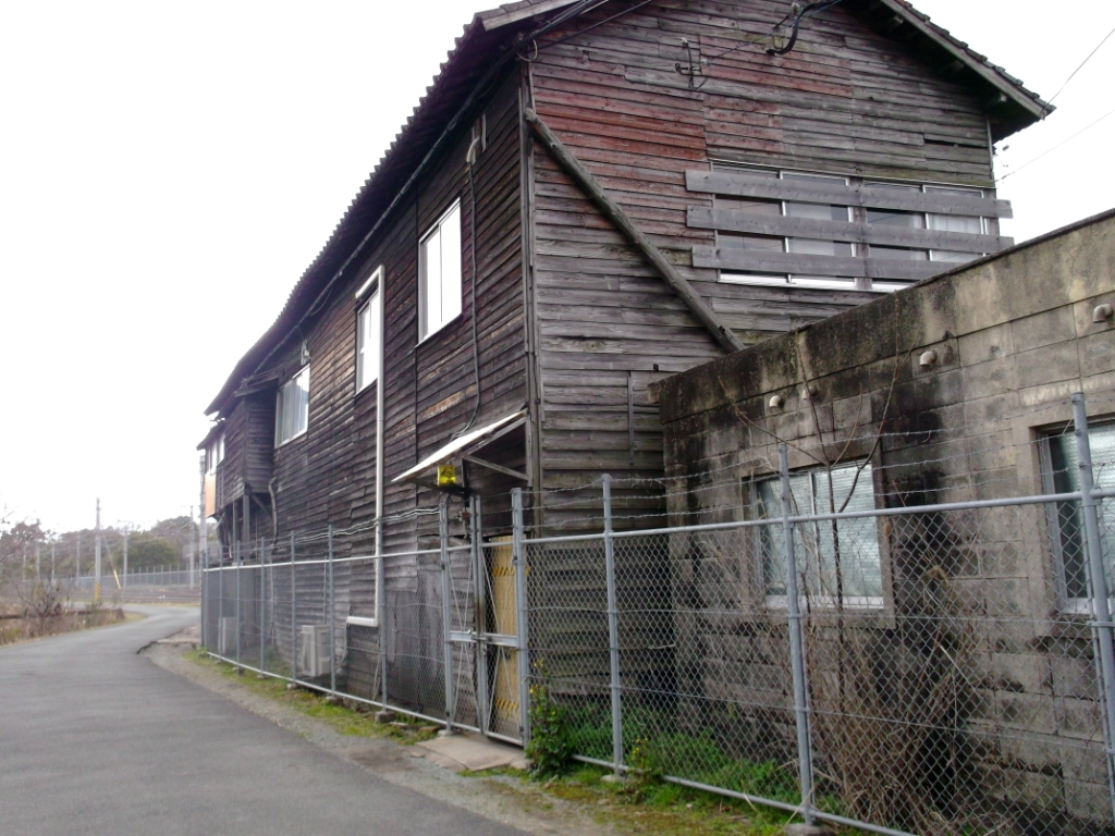 三井化学専用鉄道 宮浦駅